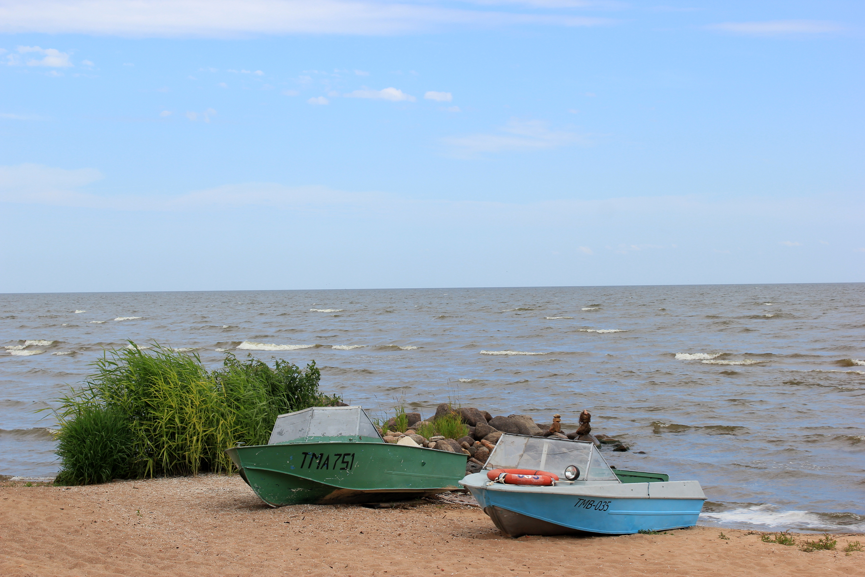 Am Peipussee in Kallaste, Estland.Hornjoserbsce: Při Peipuskim jězorje pola Kallaste, Estiska.